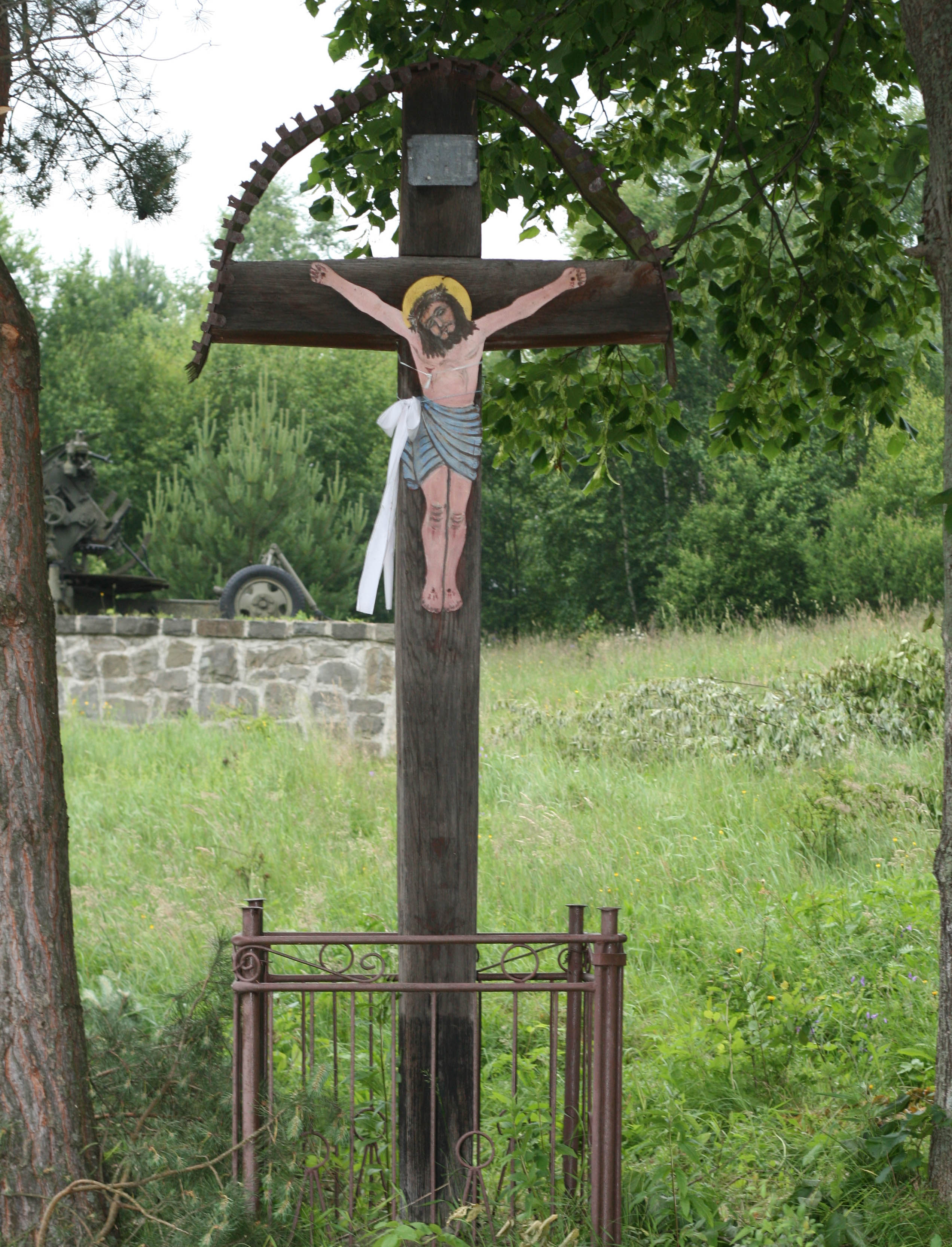 Drevený kríž v chotári obce Vyšný Komárnik